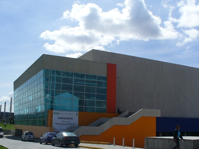 Tuzo Forum de la Zona Plateada — en Parque David Ben Gurión, Pachuca, estado de Hidalgo, México.